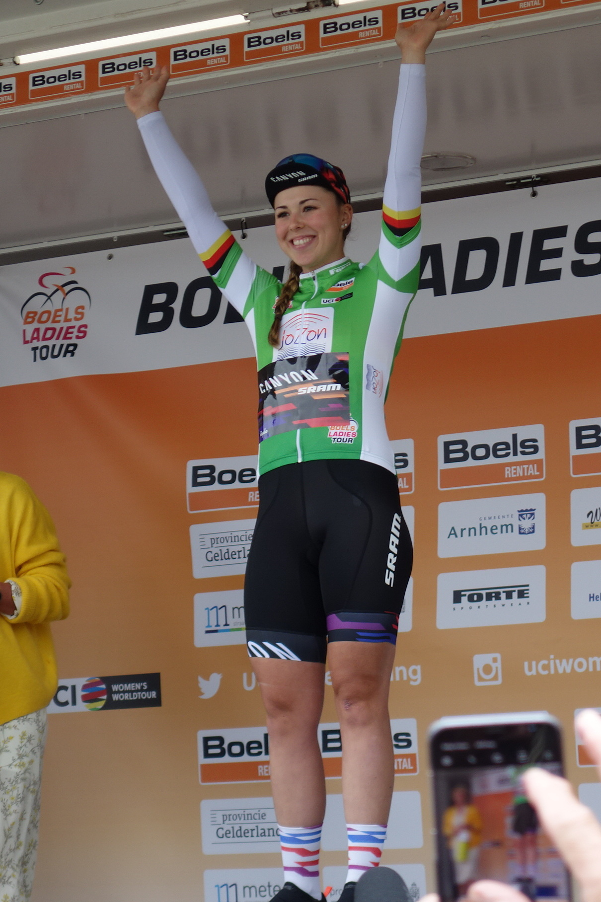 Lisa Klein kreeg de groene puntentrui na de proloog op het Tom Dumoulin Bike Park in Sittard in de Boels Ladies Tour 2019